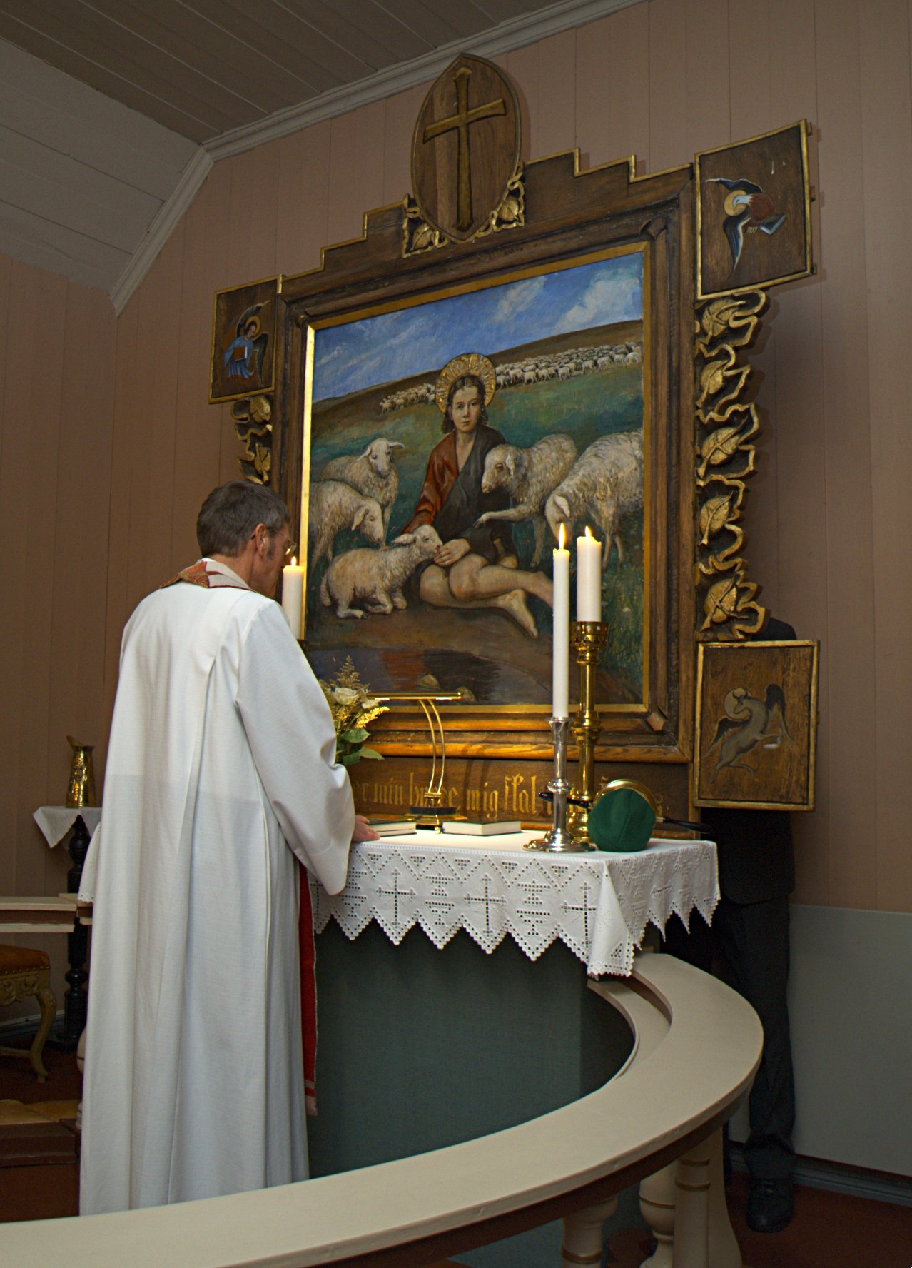 Leirskogen kirke, interiør, alter. Sokneprest Helge Hartberg foran alteret. Foto John Erling Blad